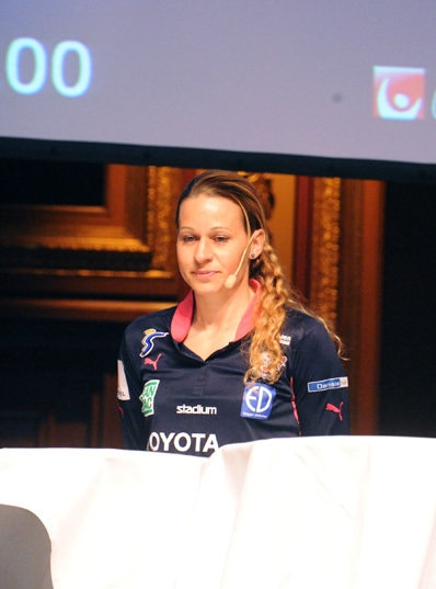 Charlotte Rohlin och Martin Sjögren